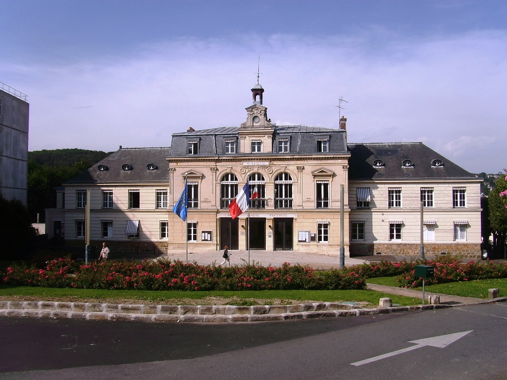 Hotel de Ville d'Orsay